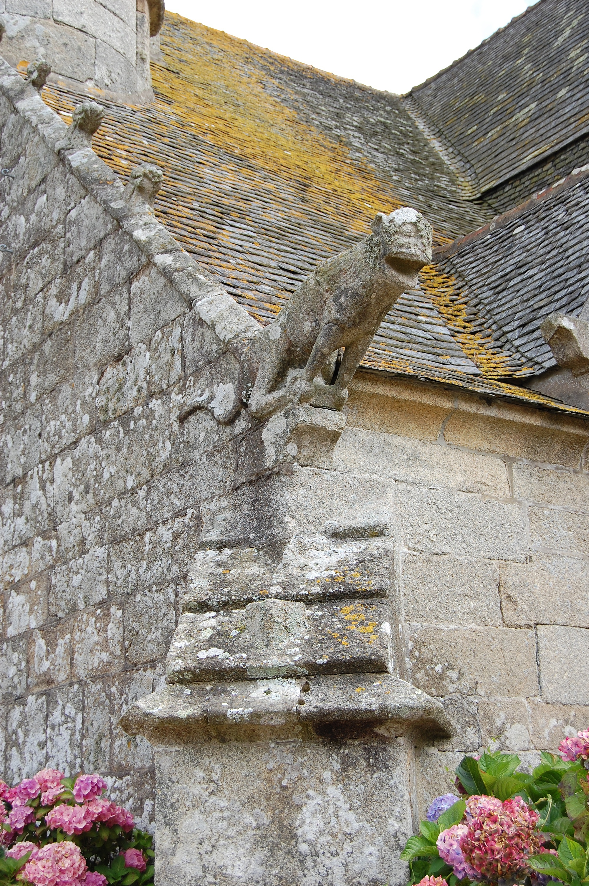 Église de Ploumilliau, France.